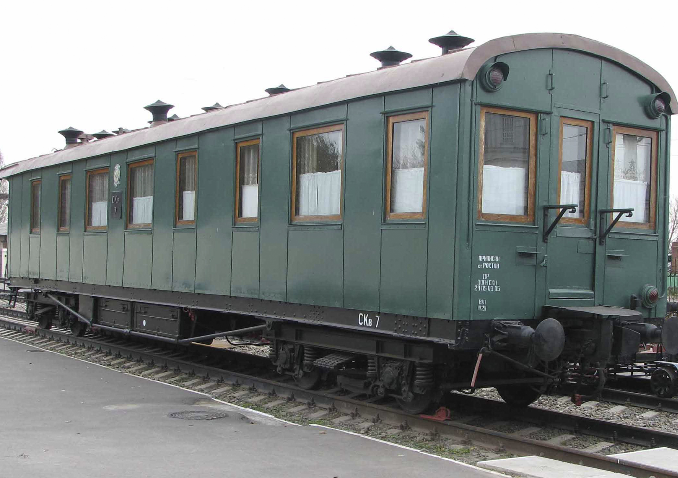 Вагон построен в 1934 году Новороссийским вагоностроительным заводом